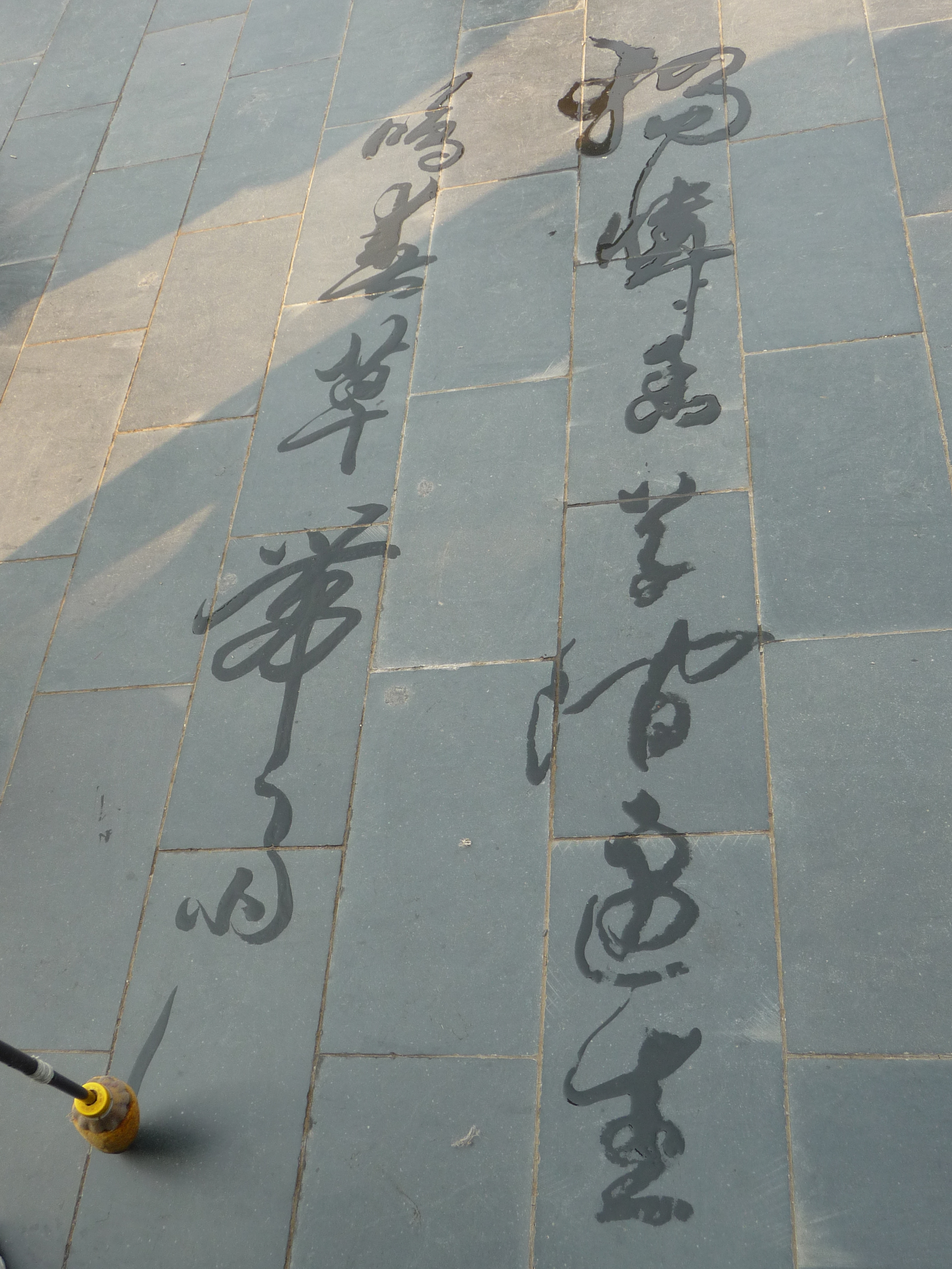 water calligraphy at the Temple of Heaven in Beijing